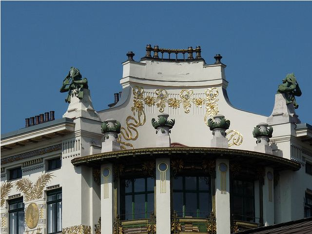 Otto Wagner Jugendstil apartments on Vienna's linke Wienzeile, along the Naschmarkt.